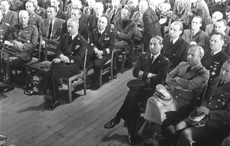 Überführung italienischer Kriegsinternierter in das Zivilarbeitsverhältnis. In einem Lager kriegsgefangener Italiener fand anlässlich der Überführung ital. Kriegs-gefangener auf Grund eines ASbkommens mit Mussolini, in das Zivilarbeitsverhältnis eine Kundgebung statt, auf der der ital. Staatssekretär des Äusseren Mazzolini, der ital. Botschafter in Berlin, Anfuso sowie der Generalbevollmächtigte für den Arbeitseinsatz, Gauleiter Sauckel sprachen. Gauleiter Sauckel übernahm die ins zivile Arbeitsverhältnis eintretende Italiener in die Obhut der Deutschen Arbeitsfront. UBz.: während der Ansprach von Gauleiter Sauckel. 2.v.l.n.r. der ital. Staatssekretär des Äusseren, Serafino Mazzolini, der ital. Botschafter in Berlin, Filippo Anfuso und der Staatssekretär des Auswärtigen Amtes von Steengracht. In der zweiten Reihe Otto Meissner 20.8.44 [Herausgabedatum] Fotograf: Schwahn; Scherl Bilderdienst